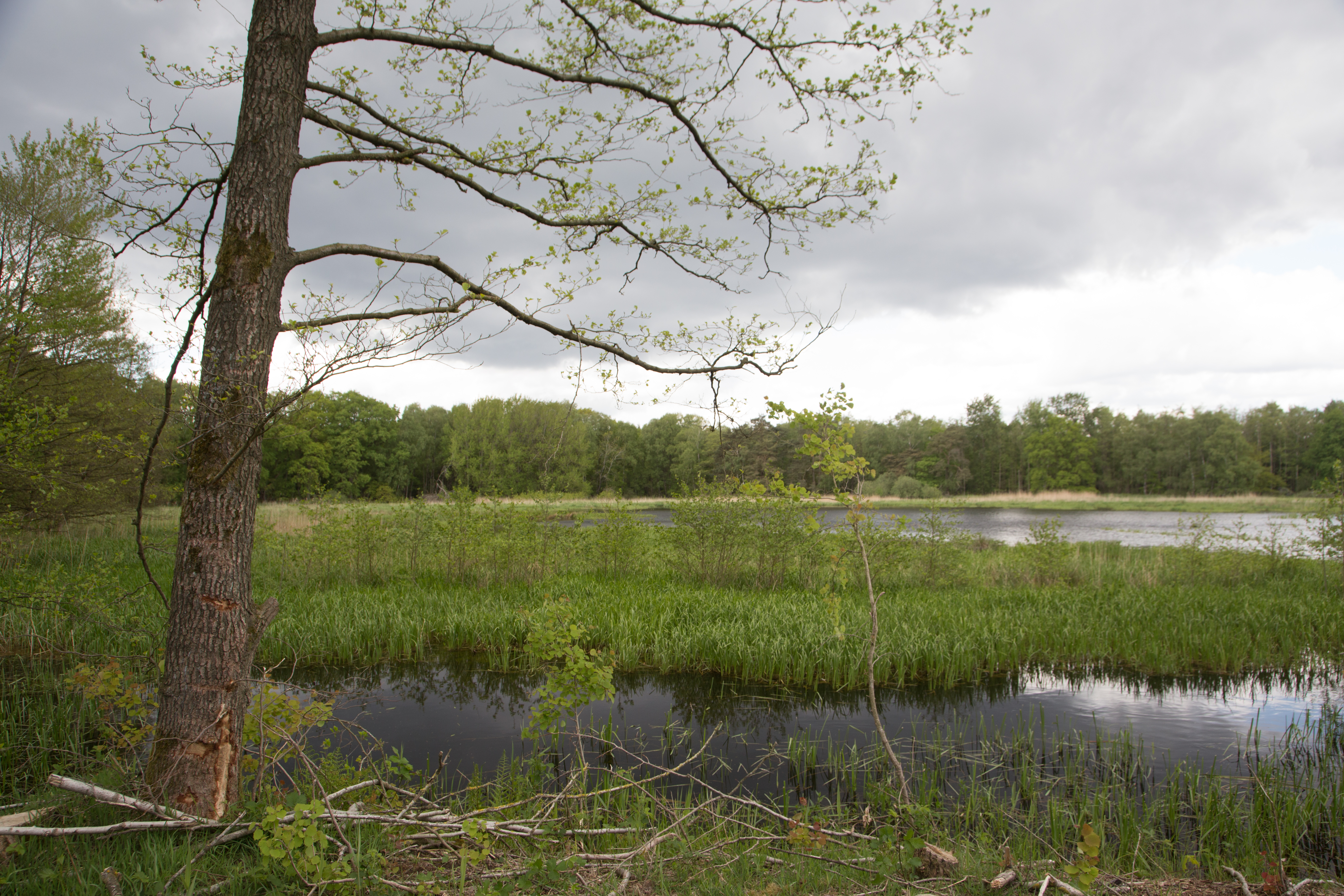 An den Ahlhorner Fischteichen